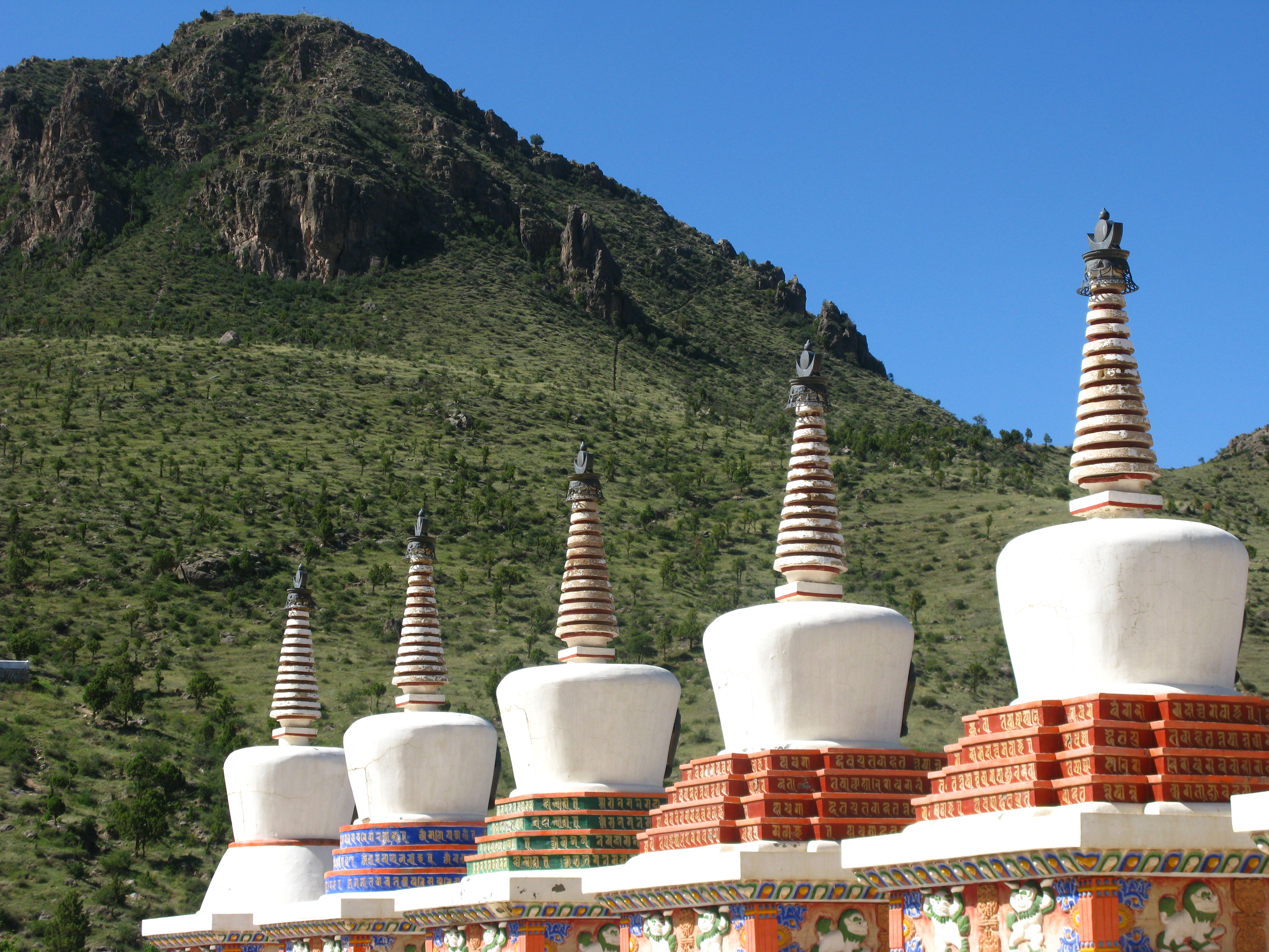 Nan Si